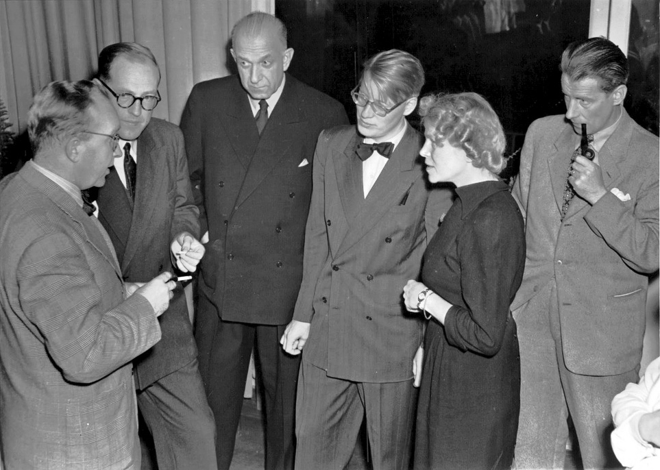 Överlärare Henning Öberg, docent Torsten Husén, med.dr. Torsten Ramer, studentkårens ordförande Göran Waldau, redaktör Elsa Appelquist och fil.lic. Valdemar Fellenius.—Ingen har större anledning än psykologen inför de testningsfrälsta att be Gud bevara sig för sina vänner, förklarade docent Torsten Husén på Kårhuset på tisdagskvällen, då han inledde studentkårens diskussion om "Samhället och testingen". De tillspetsade orden blev en koncentration av debatten, som underströk att testningen är en värdefull metod – bland andra metoder – men att den, brukad i händerna på klåpare, kan utvecklas till något av en samhällsfara.